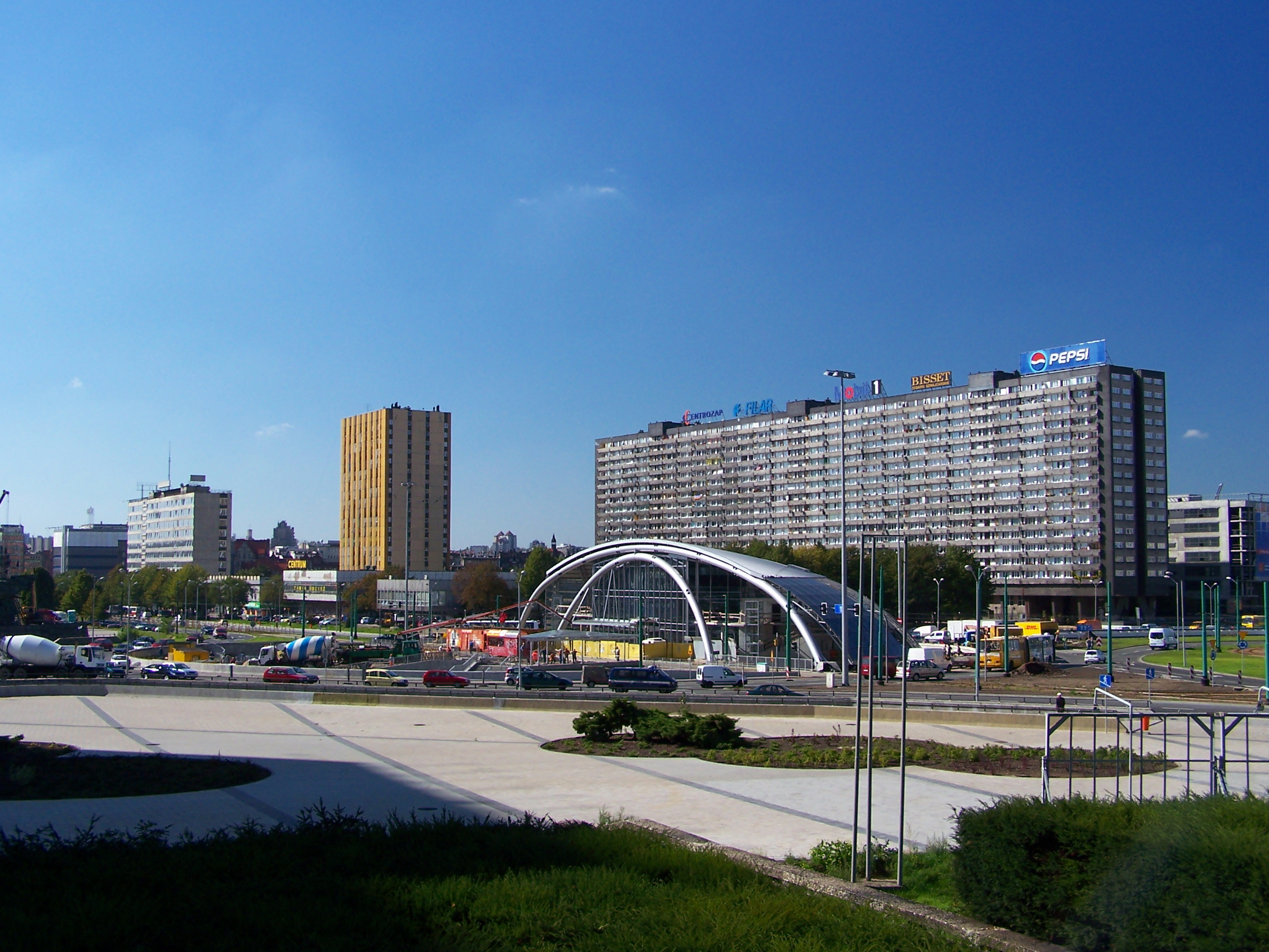 Widok na Rondo (kopuła w końcowej fazie budowy), Al. Wojciecha Korfantego w Katowicach.